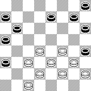 Фрагмент партии Нежметдинов-Коврижкин, 1951